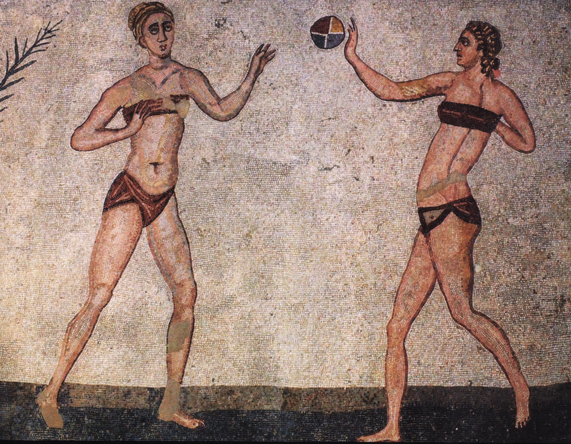 Sicile. Villa del Casale - Jeu de balle.